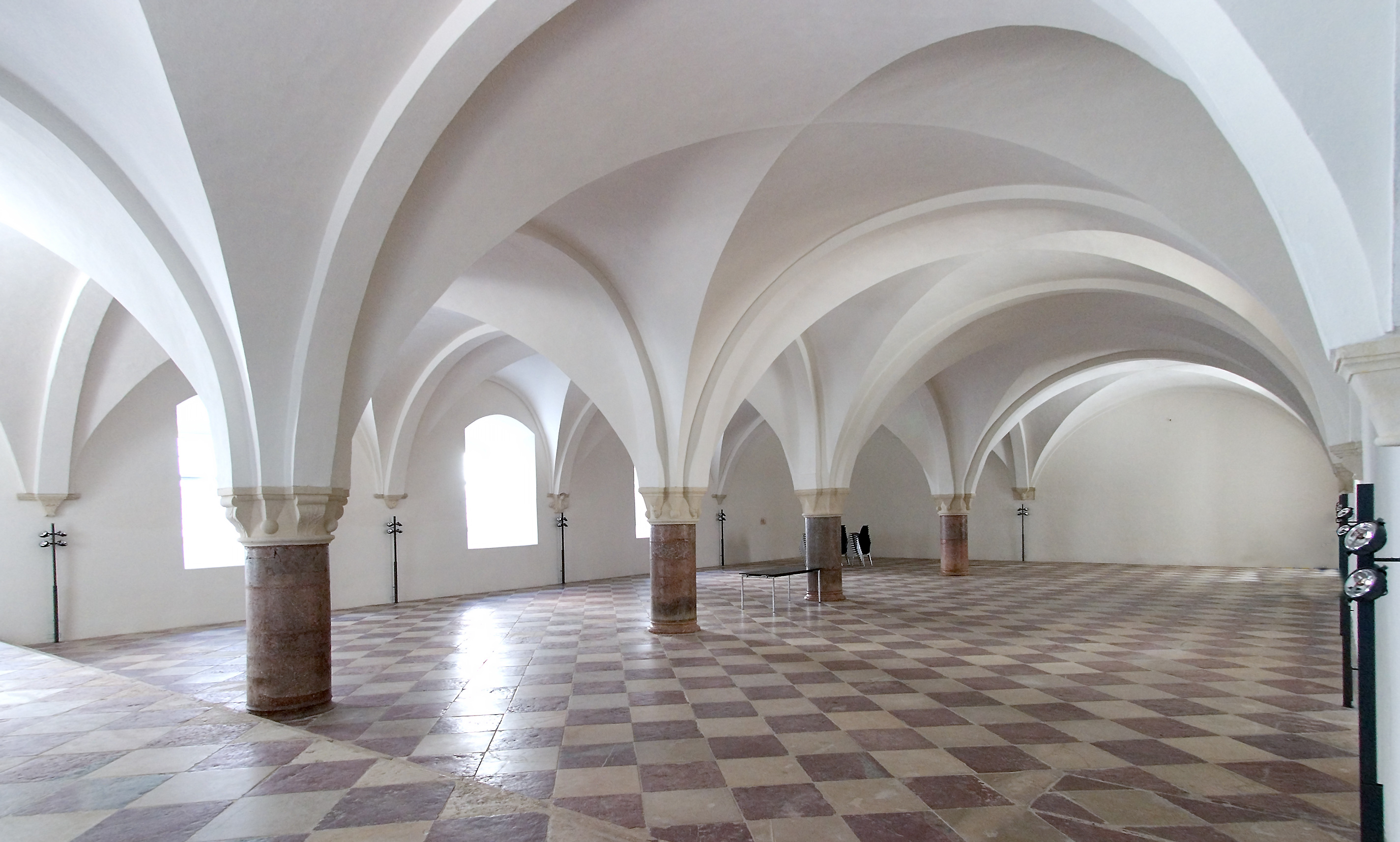 Neuburg an der Donau, Schloss, Inneres der Hofstube